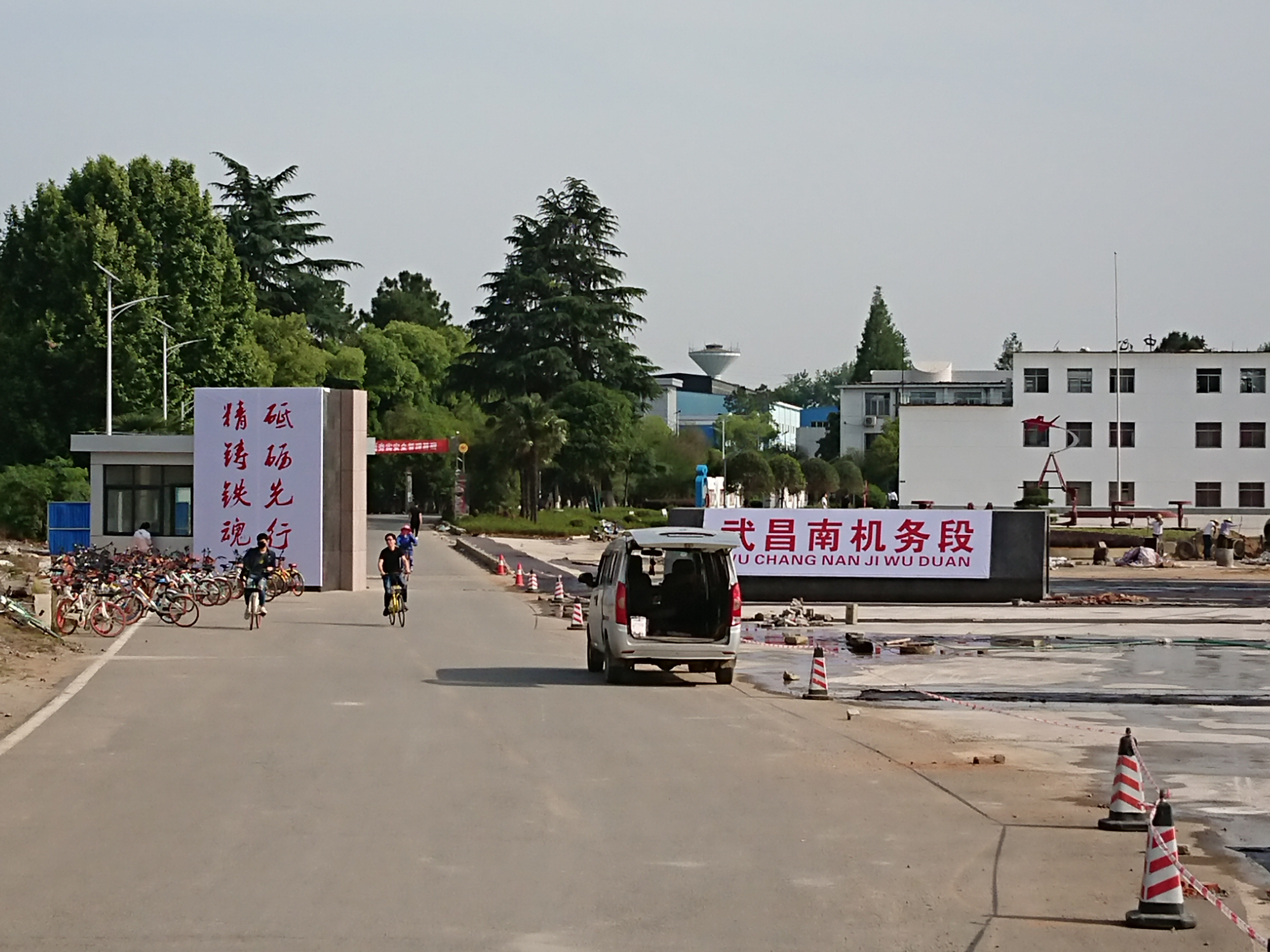 武昌南机务段新大门（2018年5月）